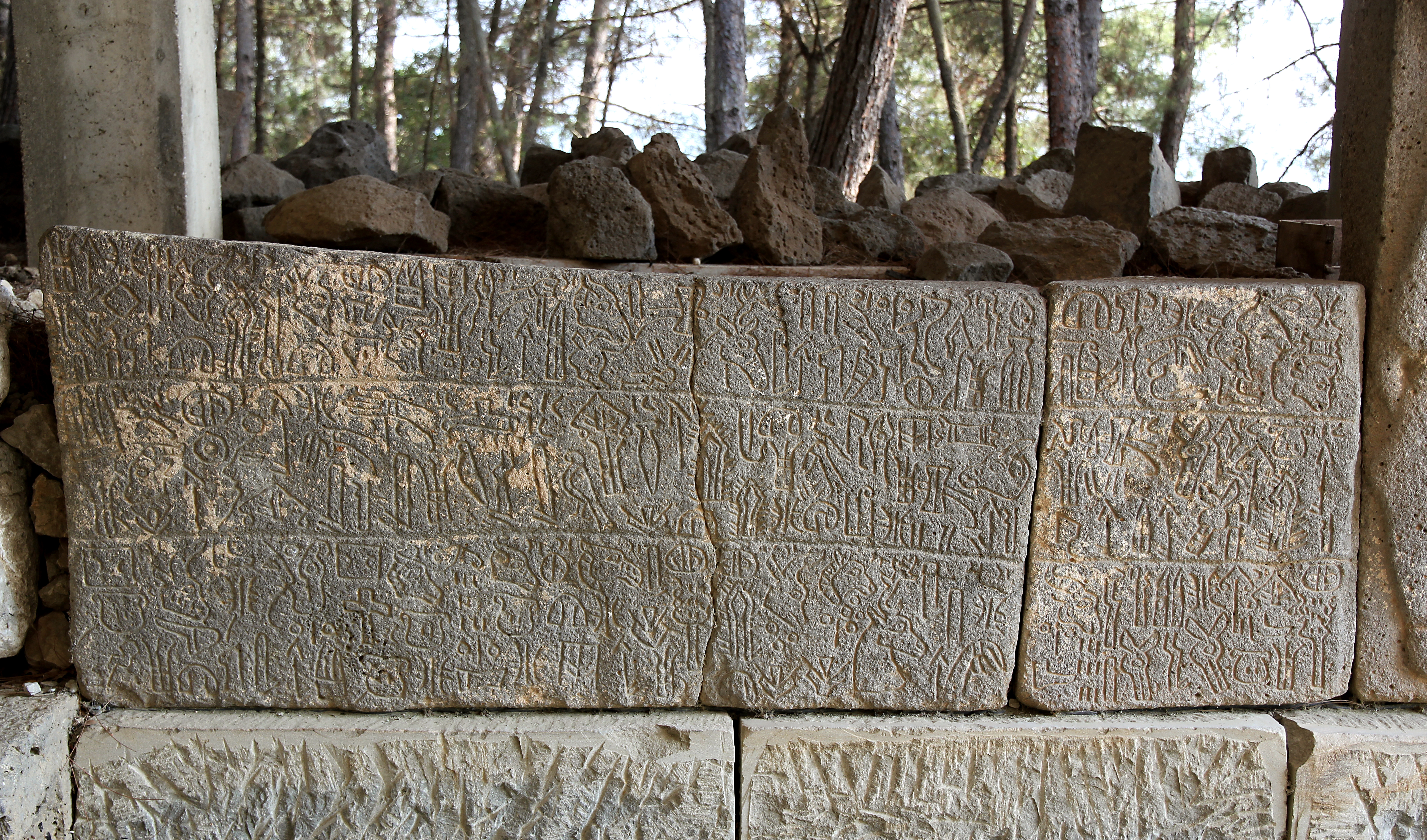 Karatepe (Asatiwataya), neo-hethitischer Fundort bei Osmaniye, Südtürkei, Luwische Hieroglyphen am Südtor